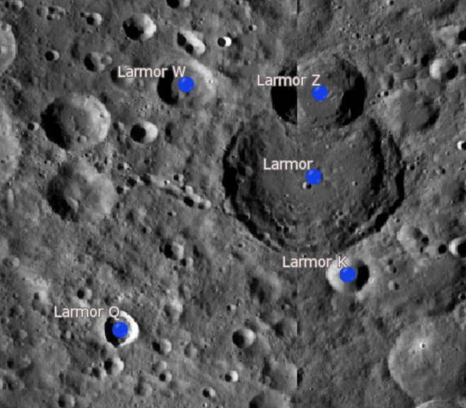 Cráter lunar Larmor. Cráteres satélite. (Imagen LRO)